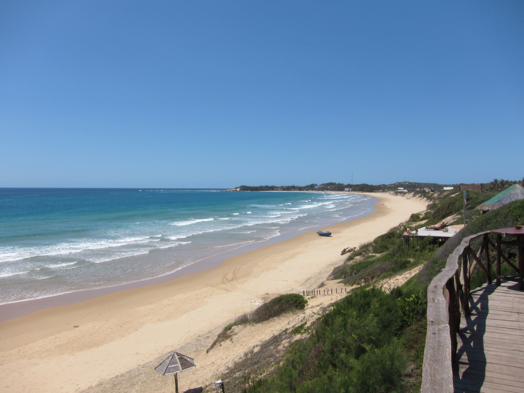 Nu wel, 30 graadjes en lekker zonnig